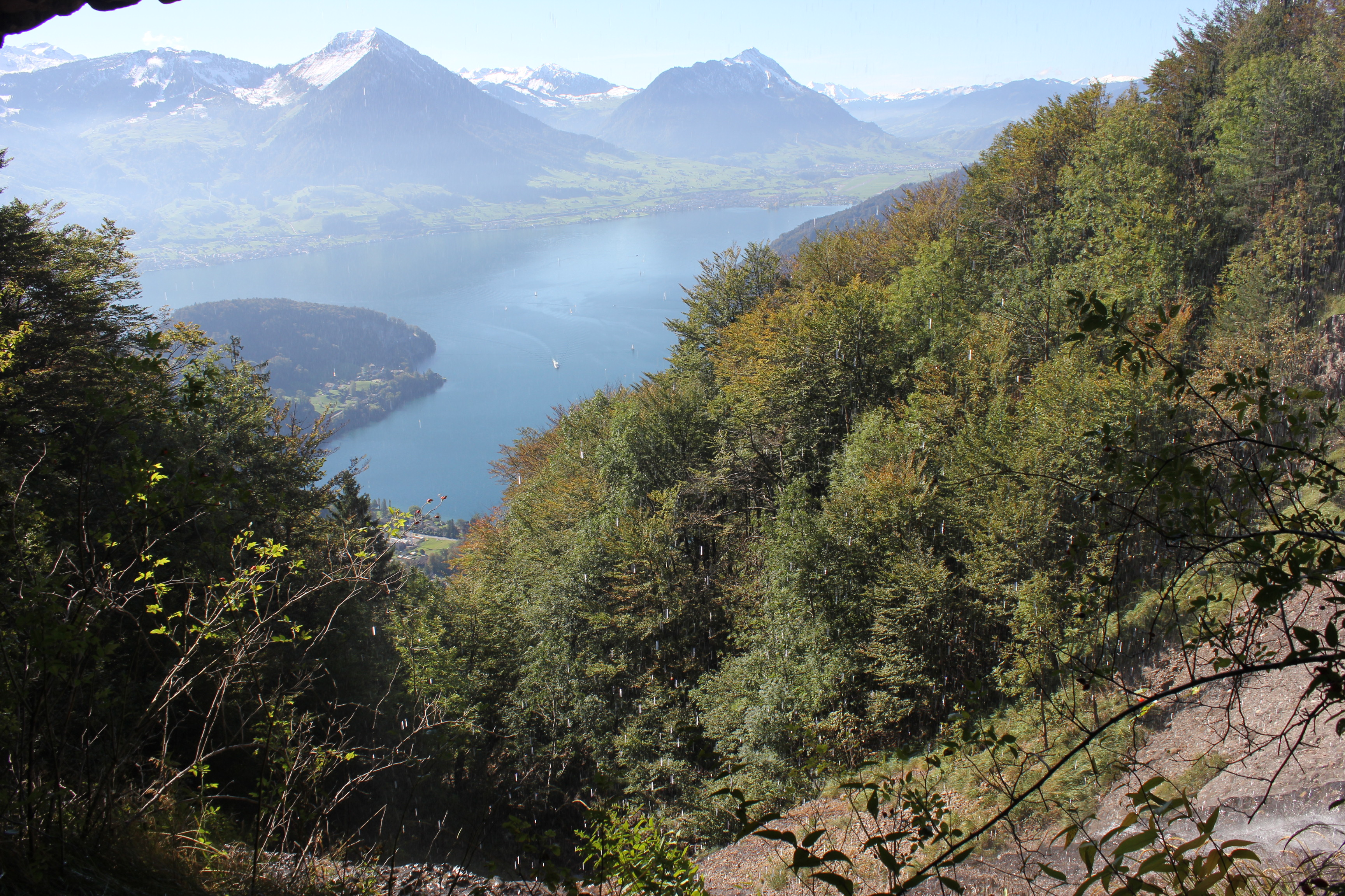 Blick von der Höhle Steigelfadbalm auf den Vierwaldstättersee und die Nidwaldner Berge.